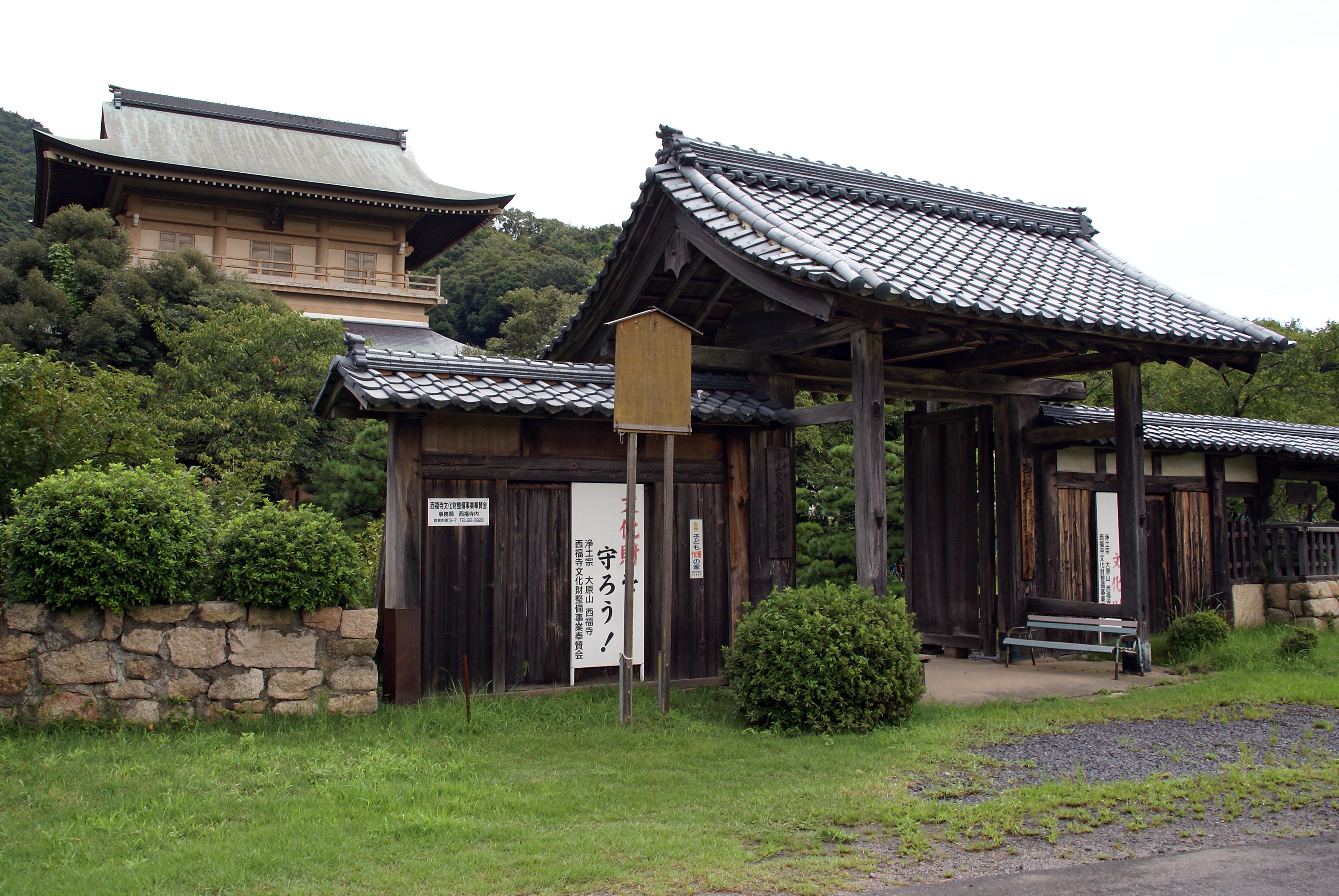 Saifukuji in Tsuruga, Fukui prefecture, Japan